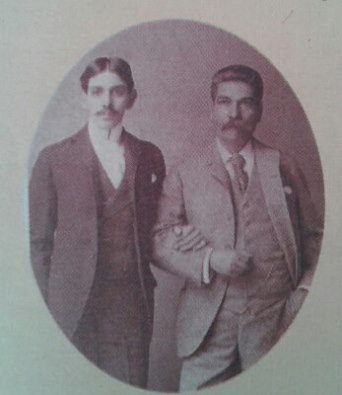 Manuel Lisandro Barillas y su hijo, fotografiados en la década de 1890.